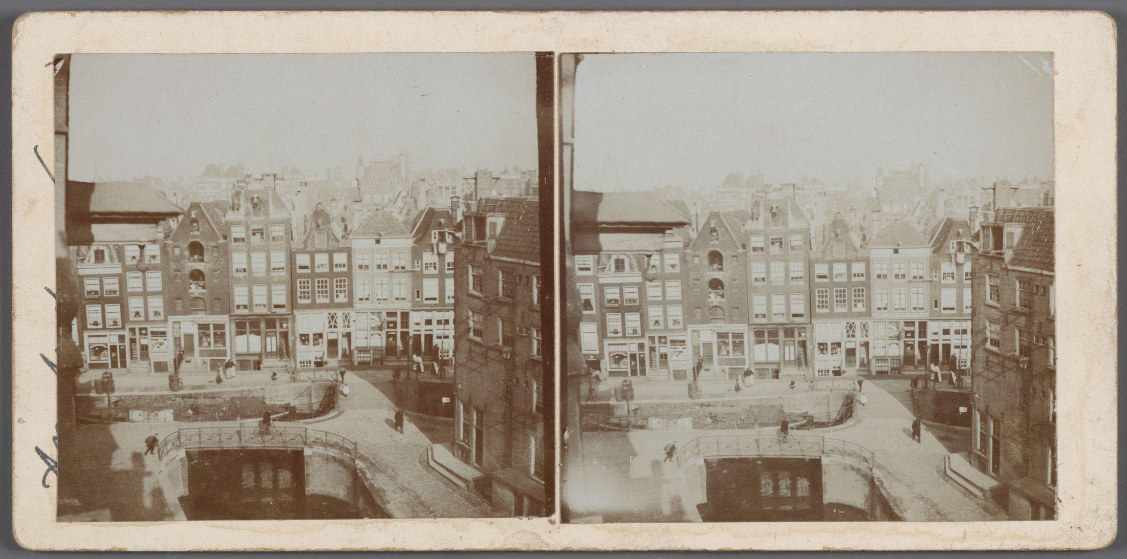 Beschrijving Recht Boomssloot 41 t/m 55 (v.l.n.r.) Mogelijk gezien vanuit het huis aan Krom Boomssloot 2 of Recht Boomssloot 34 in noordelijke richting. Op de voorgrond brug nr. 295 (van links naar rechts) en brug 296 (van boven naar beneden); en de kruising met de Krom Boomsssloot. Rechts Krom Boomssloot 1. Documenttype foto Vervaardiger Benschop, Maarten Collectie Collectie Stadsarchief Amsterdam: stereofoto's Datering 1900 ca. Geografische naam Recht Boomssloot Inventarissen Afbeeldingsbestand 010007000498 Generated with Dememorixer